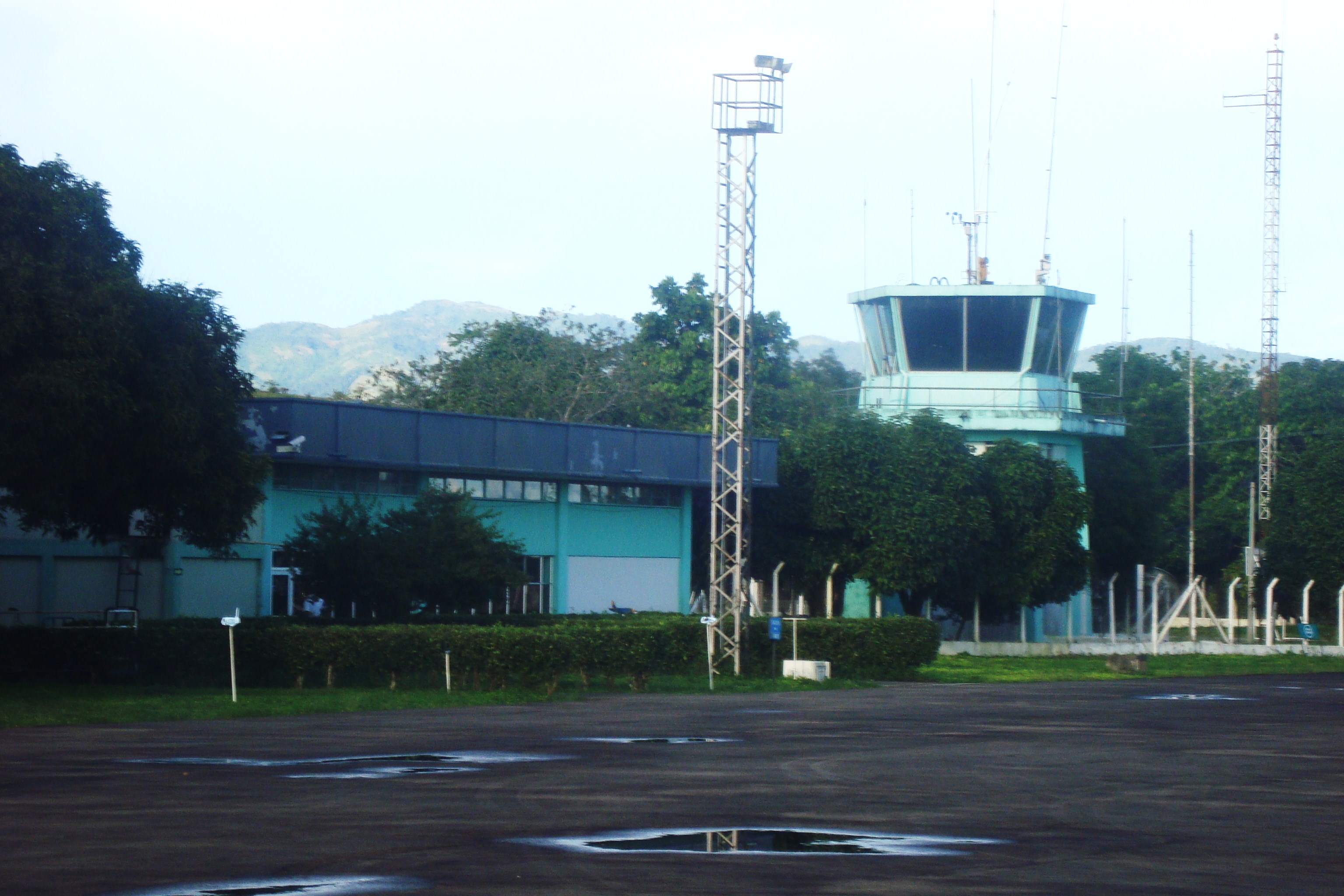 Terminal de Pasajeros y Torre de Control del Aeropuerto Gustavo Artunduaga de Florencia (Caquetá)